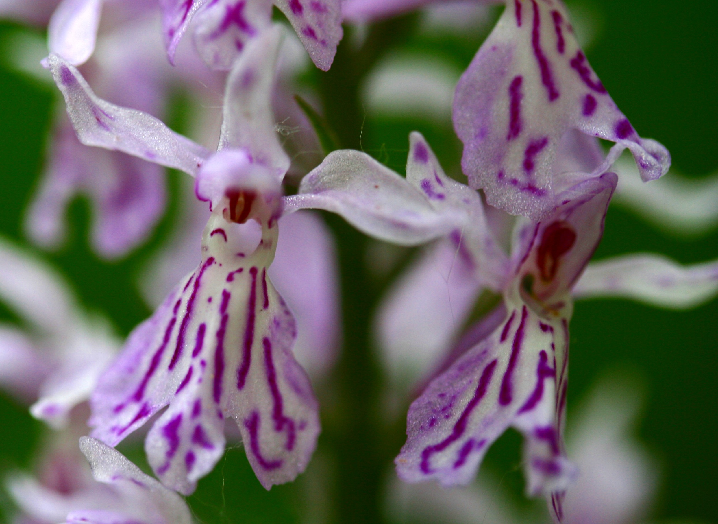 Concordia - Località: Pellegai, Mel (BL), 503 m s.l.m.